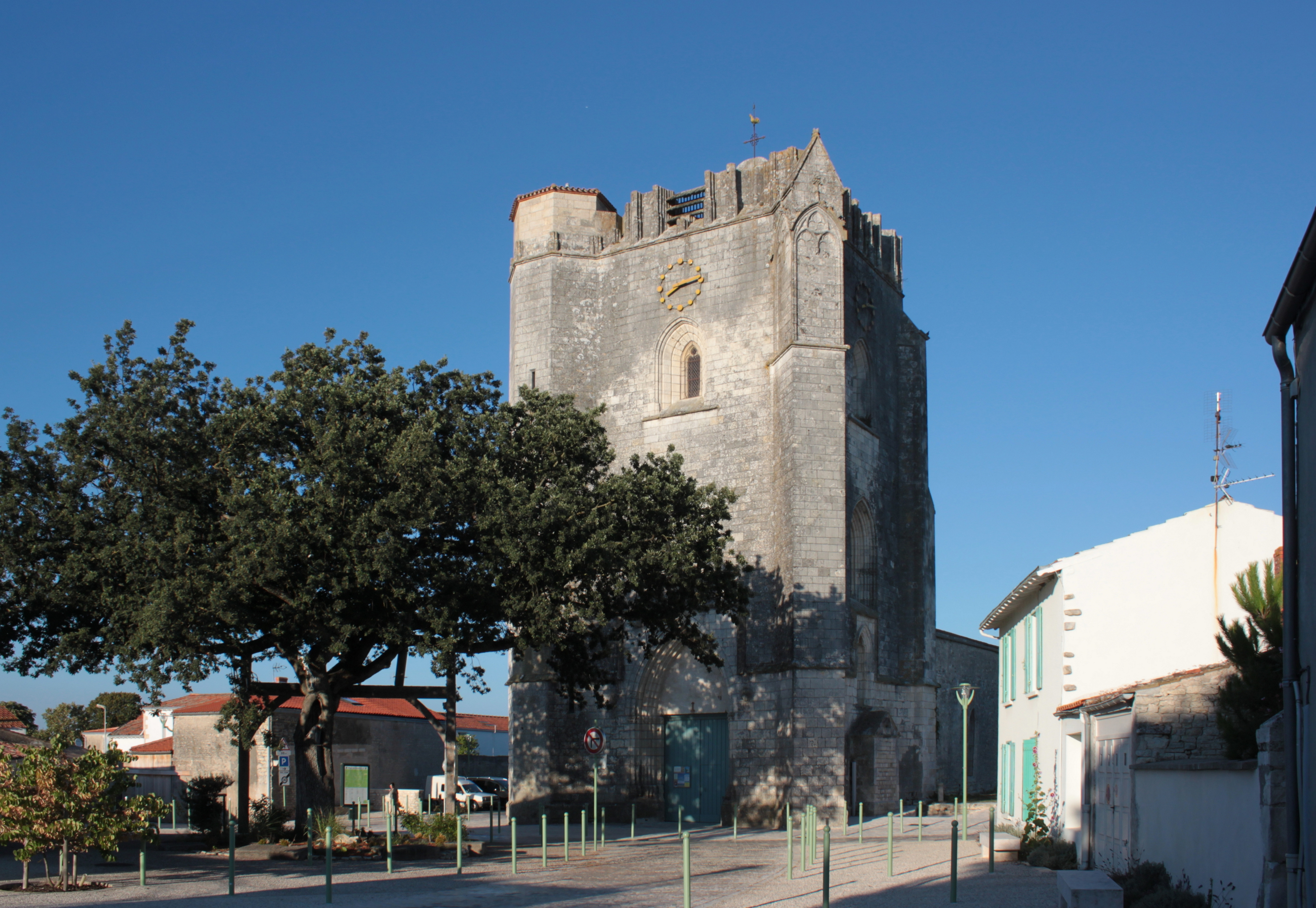 Église Saint-Pierre, Fr-17-Marsilly.